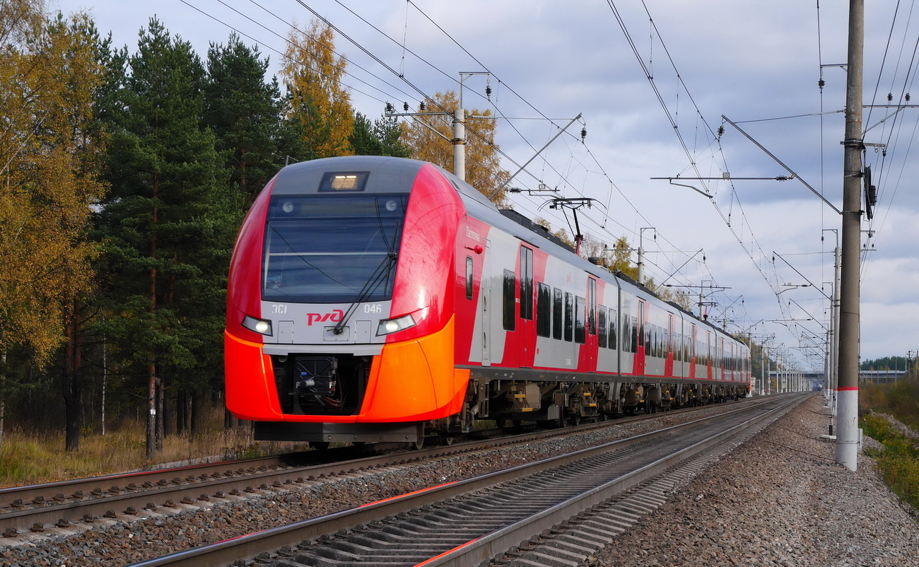 Электропоезд повышенной комфортности, построен в пятивагонной составности В составе 1 вагон 1-го класса и 4 вагона 2-го класса. С завода поступил в Северо-Западную дирекцию скоростного сообщения. В марте 2016 г. передан в Южную Дирекцию скоростного сообщения. 15.08.2014 — пробный рейс по маршруту Новосибирск — Барнаул с составе сплотки ЭС1-046/047. Состав 046 следовал головным по маршруту Барнаул — Новосибириск, состав 047 — по маршруту Новосибирск — Барнаул.